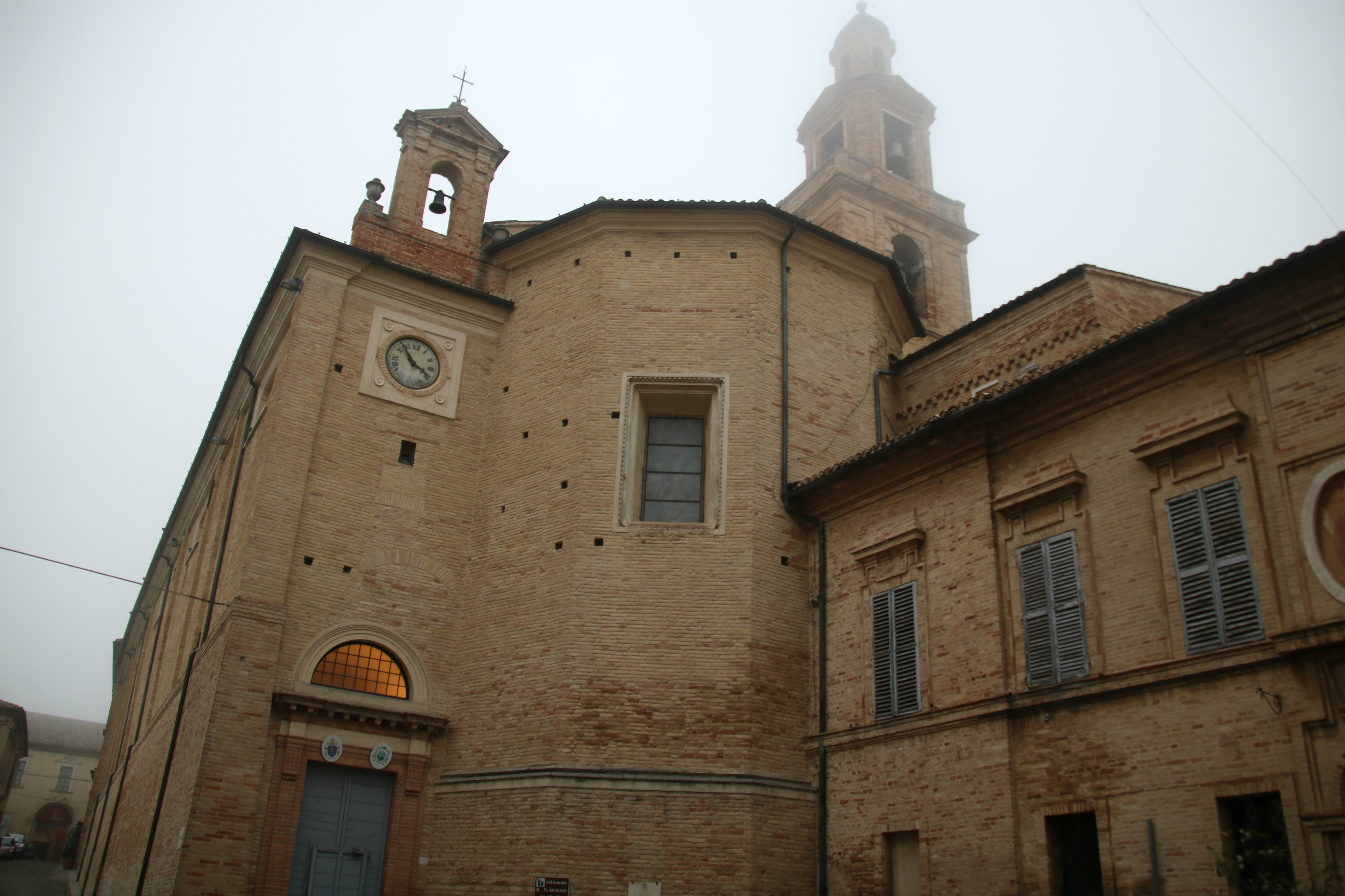 Concattedrale di San Flaviano (Recanati)